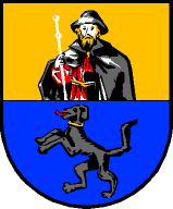 Gemeinde Werfen: Im geteilten Schild oben in Gold die wachsende vorwärtsgekehrte Gestalt eines Pilgers mit rotem Kleide, schwarzem Mantel und ebensolchem barettartigem Hut, in der Rechten einen Pilgerstab haltend, die Linke in die Seite gestützt, unten in Blau ein aufrechter rechtsgewendeter schwarzer Hund